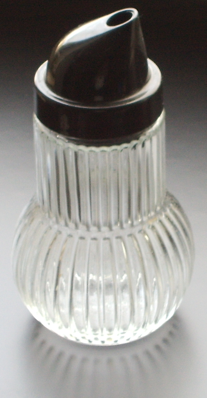 Zuckerstreuer, Sugar dispenser